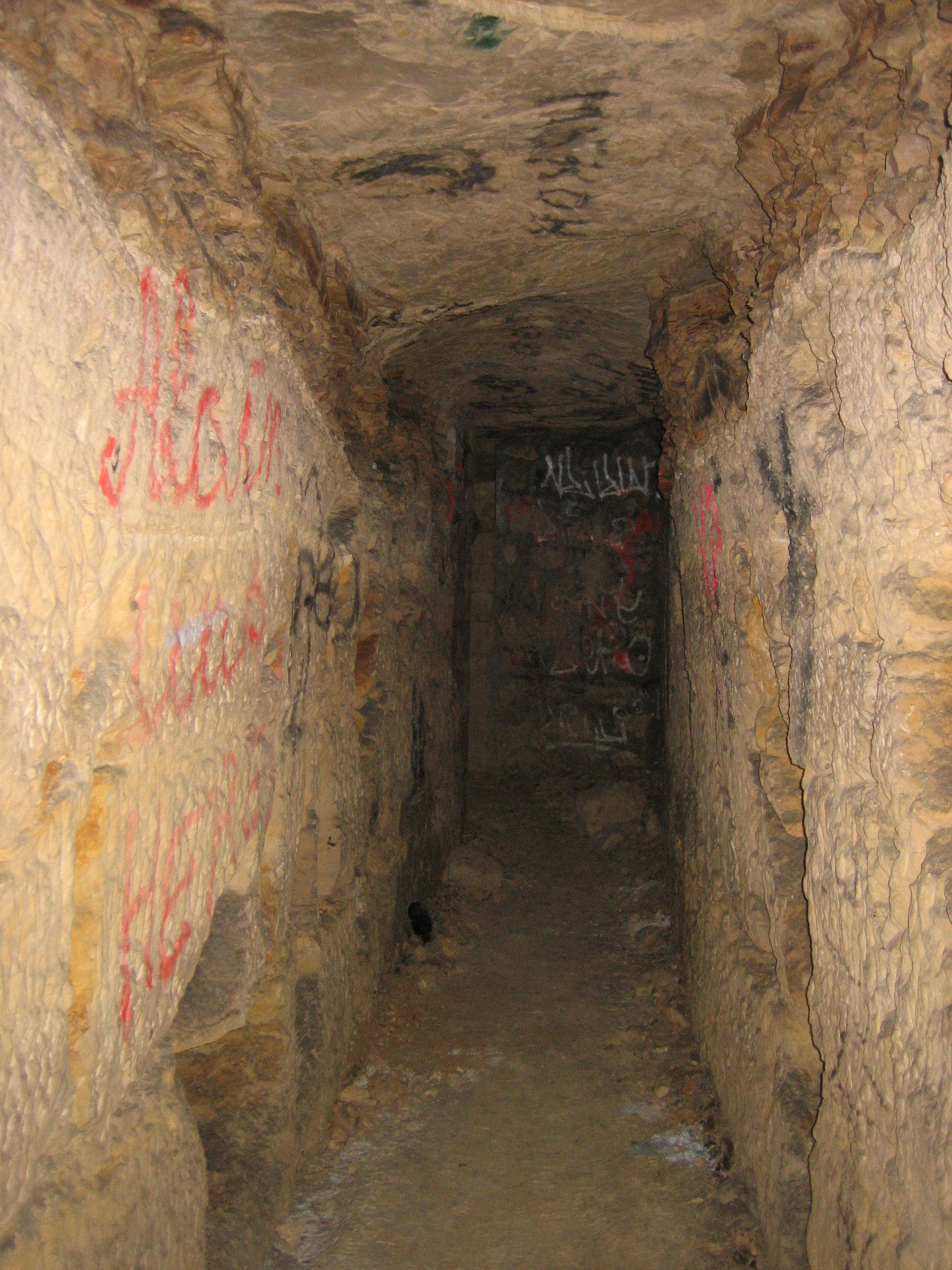 Promenade dans les catacombes de Paris, près du Charlety